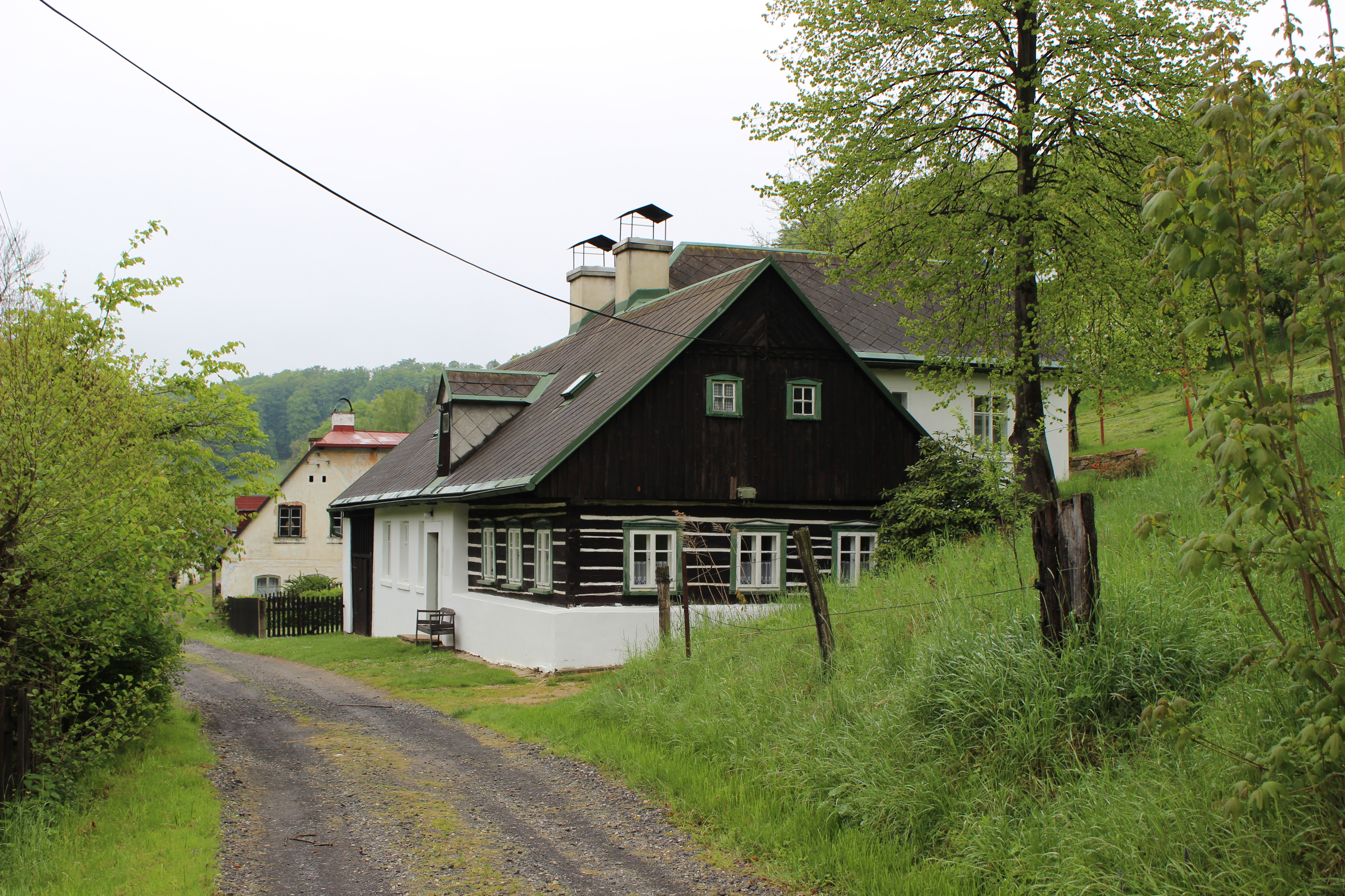 Dům číslo evidenční 11 v Pekle, části Raspenavy.